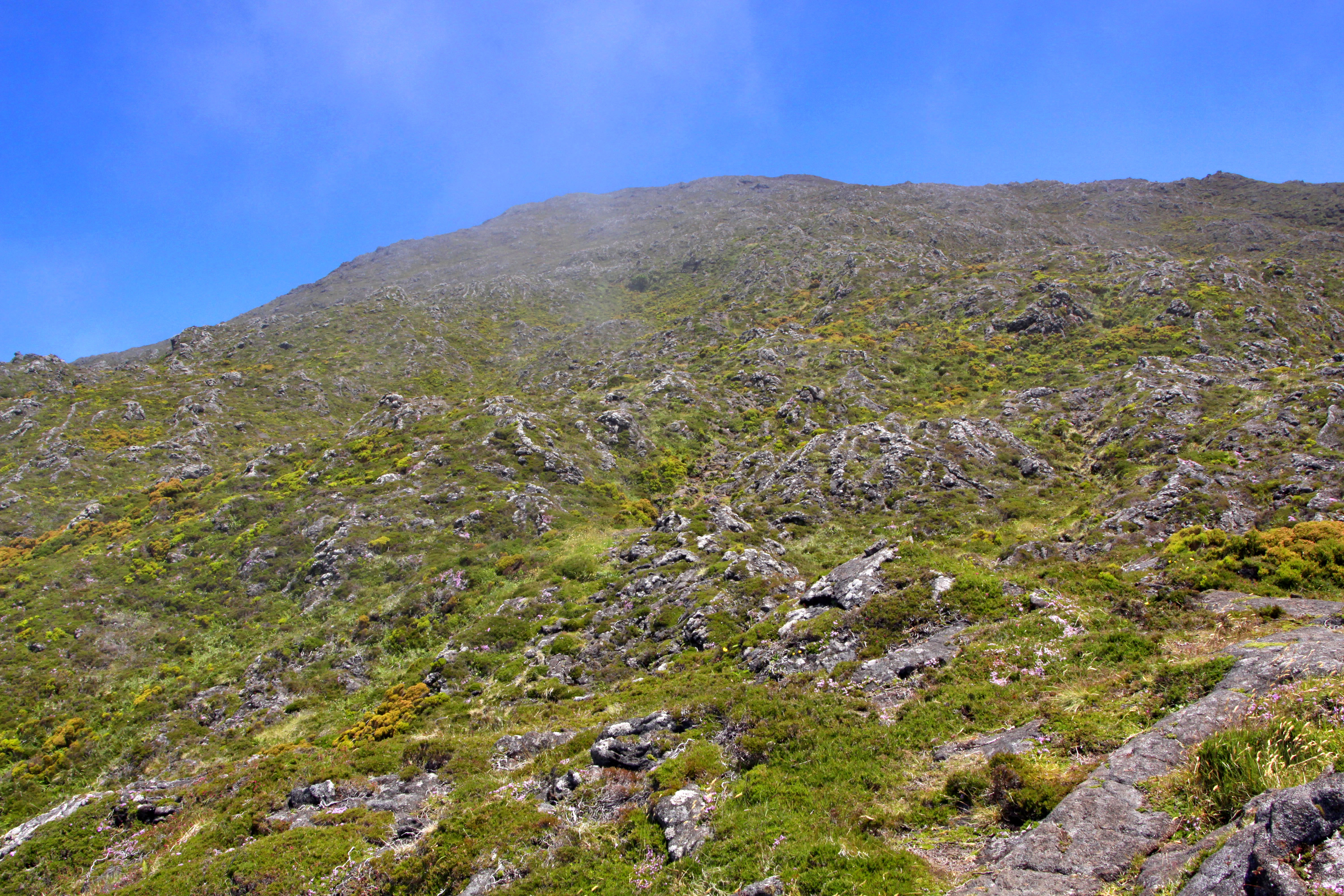 Ilha do Pico, Açores. En redescendant du Pico.